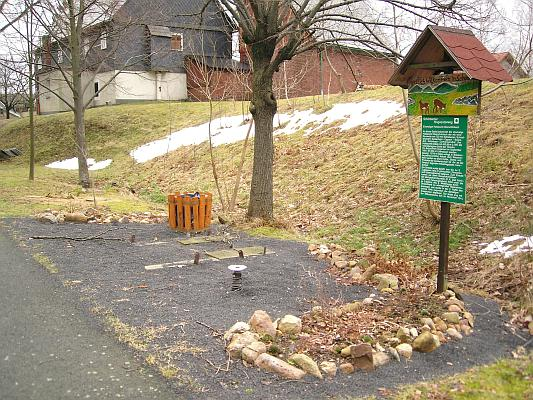 Haltepunkt Oberschönbach, Schmalspurbahn Taubenheim—Dürrhennersdorf